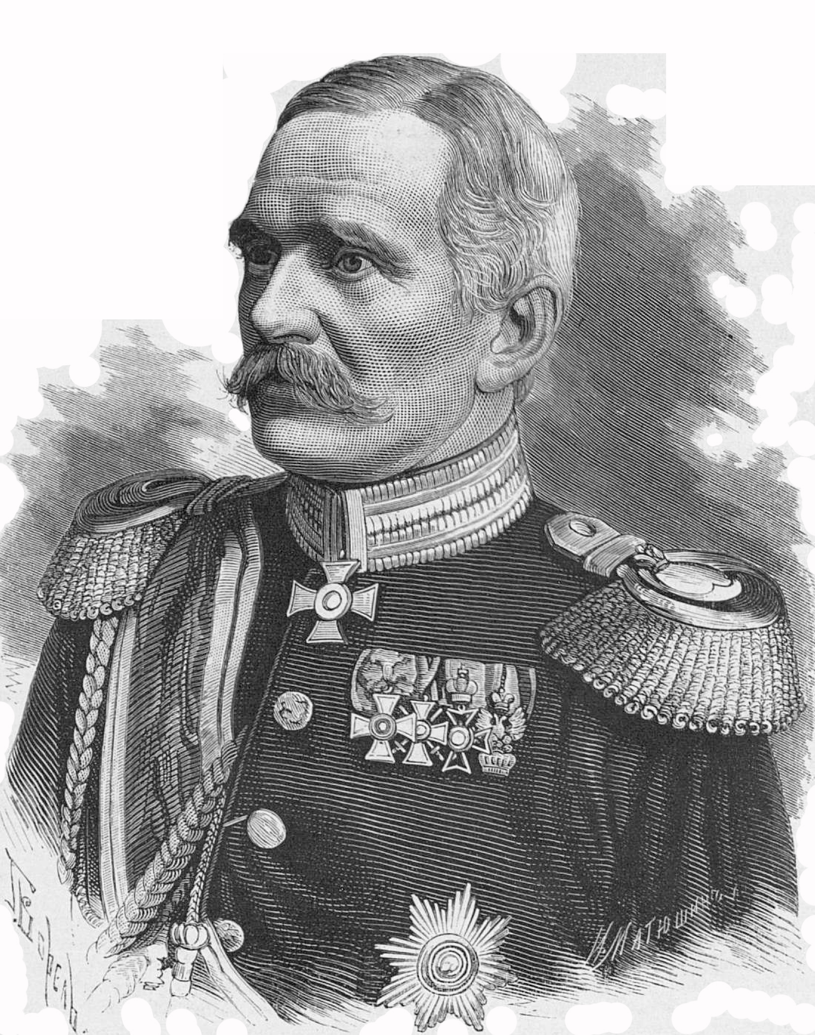 Швейниц, Ганс Лотар — германский генерал от инфантерии и дипломат.